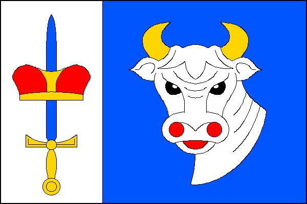 Vlajka obce Svinaře